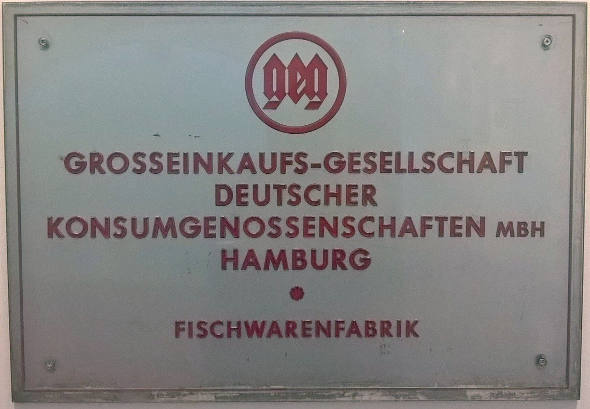 Historisches Fabrikschild einer GEG-Fischfabrik in Hamburg